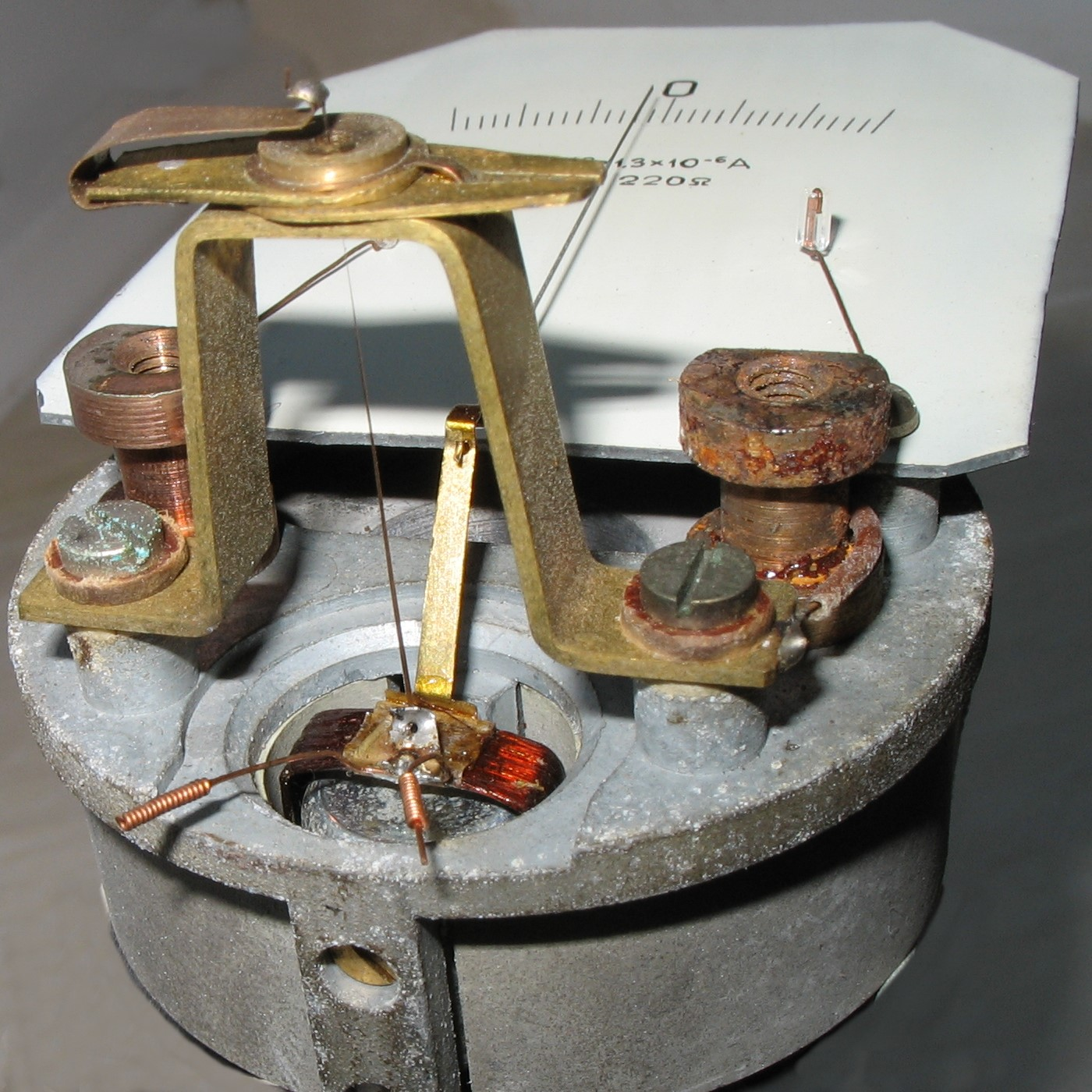 Galwanometr z połowy XX w. D'Arsonval galvanometer movement. Note that this movement is actually of the D'Arsonval form, with torsion wire suspension, not the later and far more common Weston design with pivots and hairsprings.